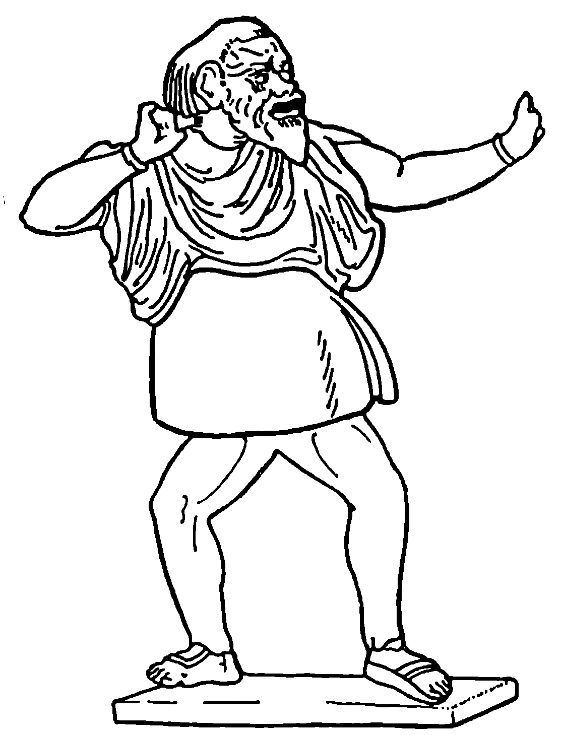 Immagini dal libro Le commedie di Aristofane